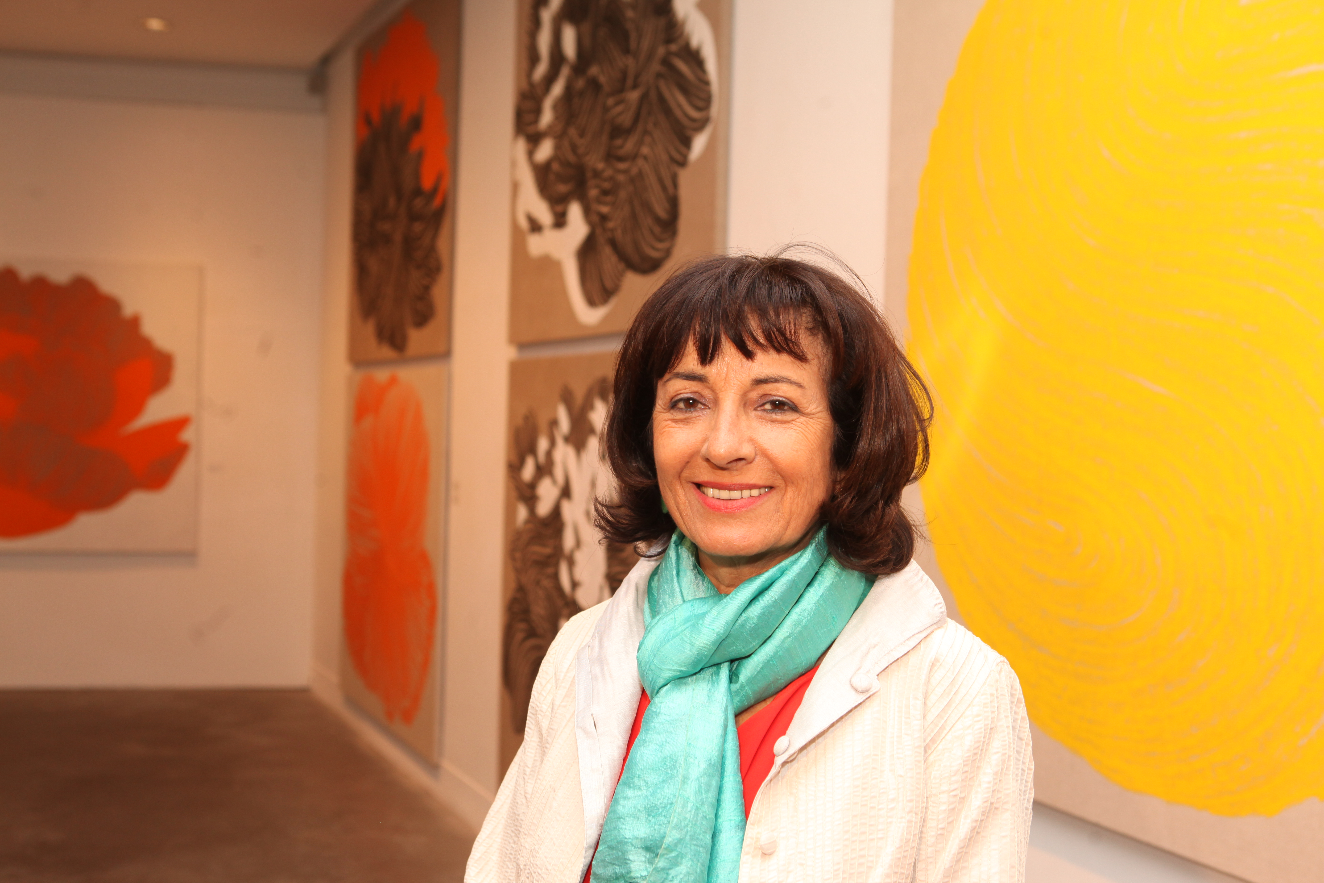 Portrait réalisé lors de l'exposition "20 ans d'œuvres" à l'Atelier 21, Casablanca